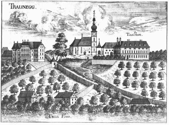 Schloss Traunegg nach einem Stich von Georg Matthäus Vischer von 1674 Topographia Austriae superioris modernae